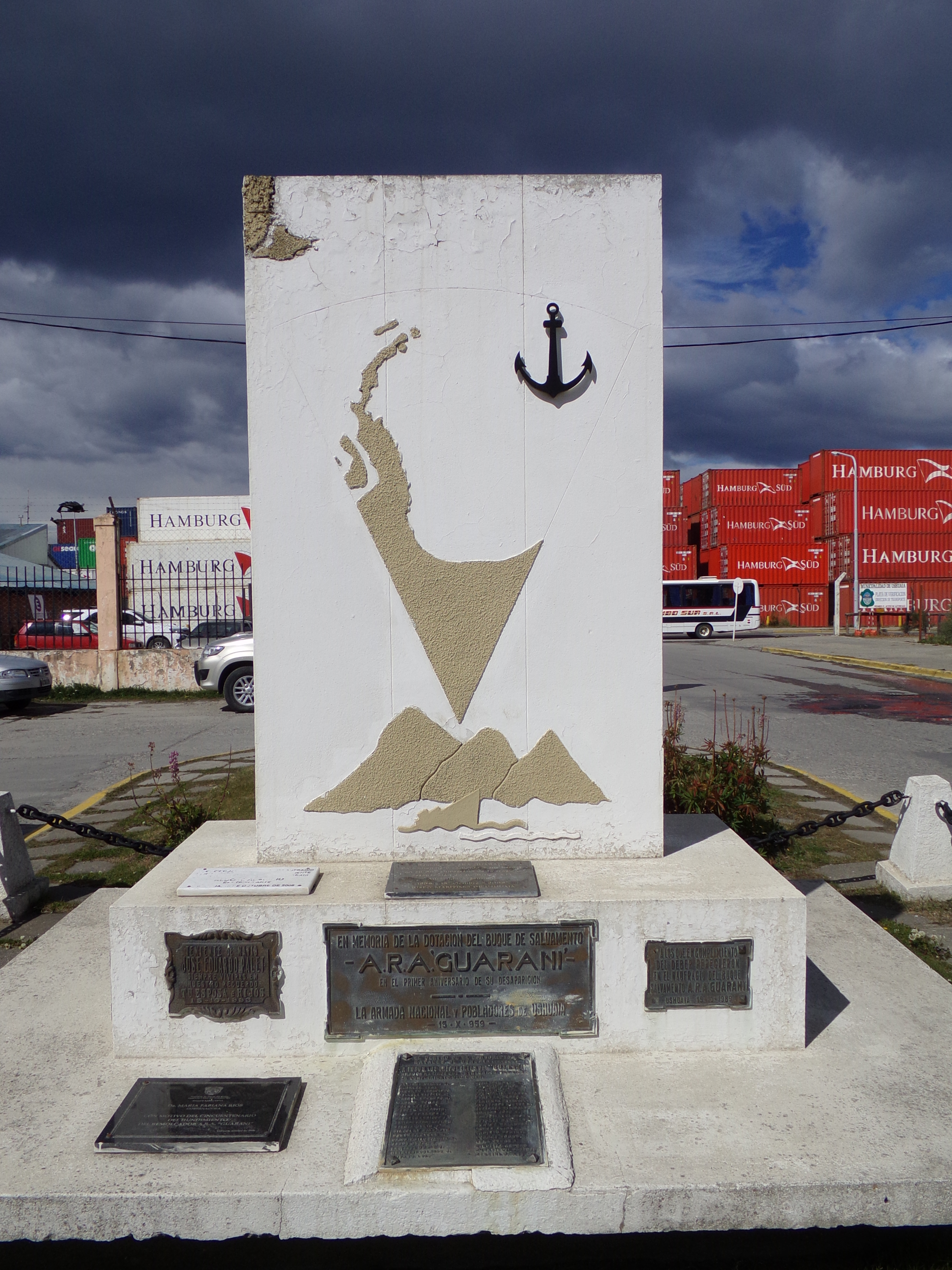 Memorial ARA Guaraní